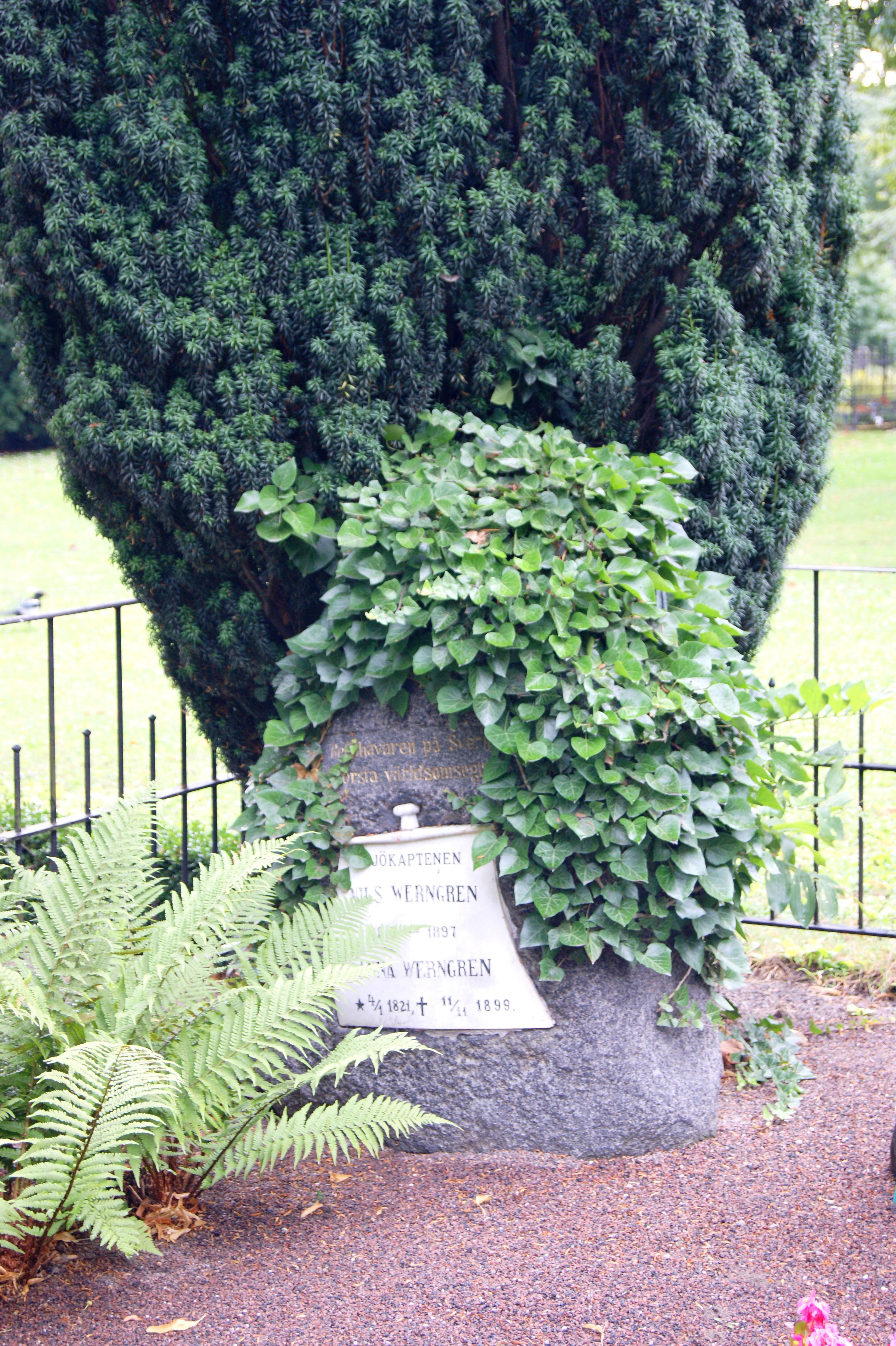 Malmö Gamla kyrkogården - Nils Werngren